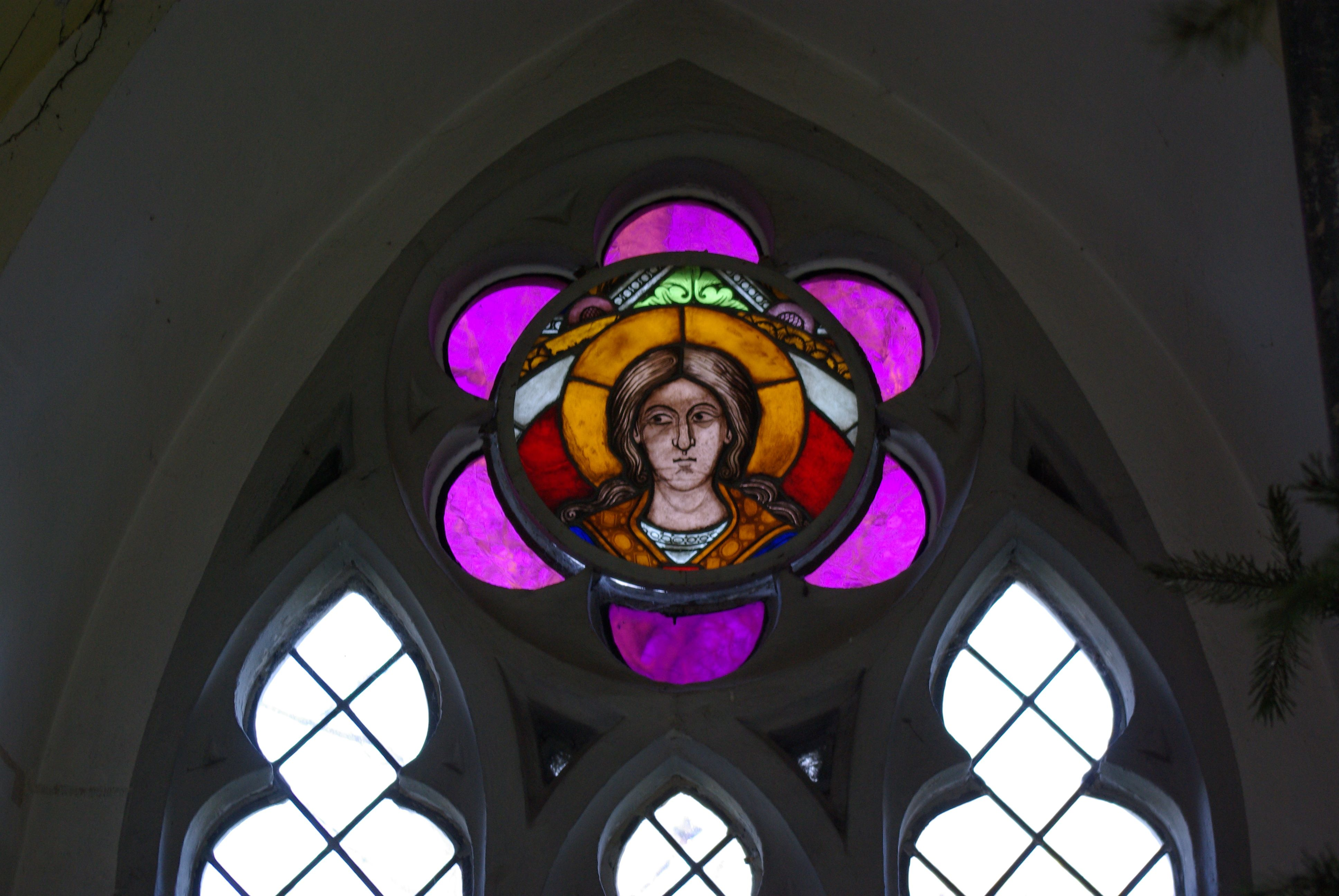 Paretz, Brandenburg, Deutschland, in der Kirche ein Glasfenster